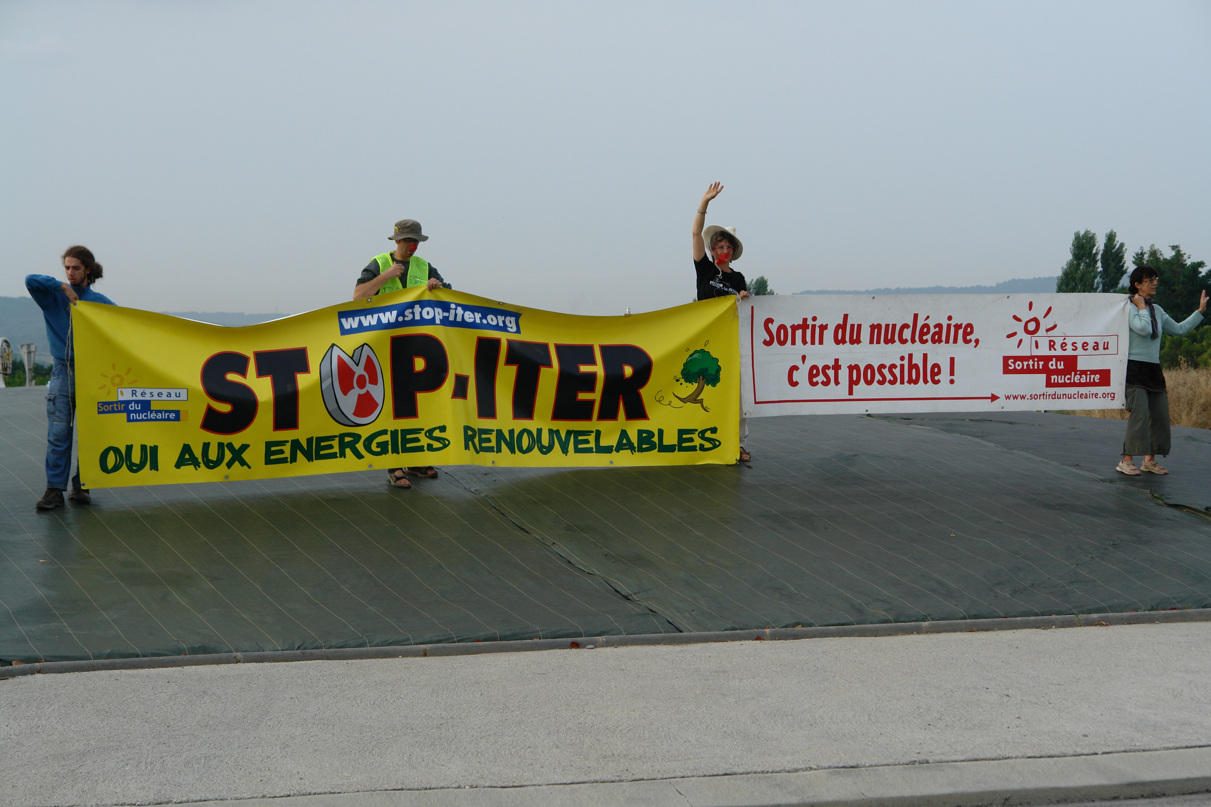 Banderoles « Stop-ITER, oui aux énergies renouvelables » et « Sortir du nucléaire, c'est possible », Pertuis, août 2009.